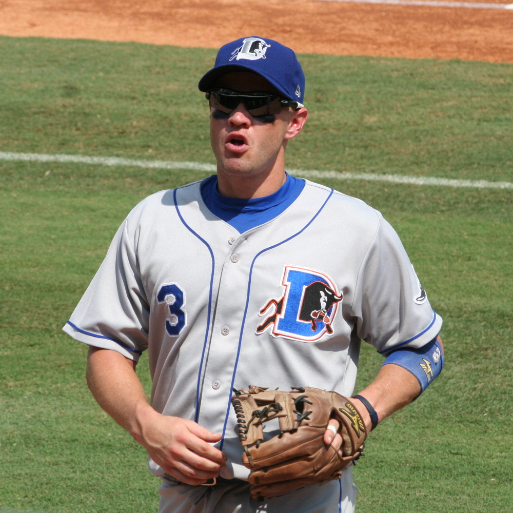 J. J. Furmaniak